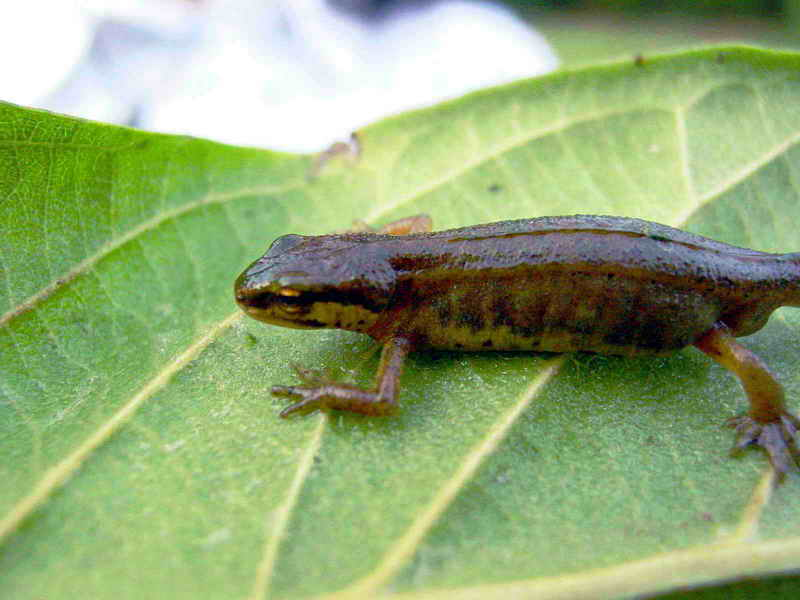 Foto tirada cunha Nikon E8800. Self made Cesuras - Galicia - Spain